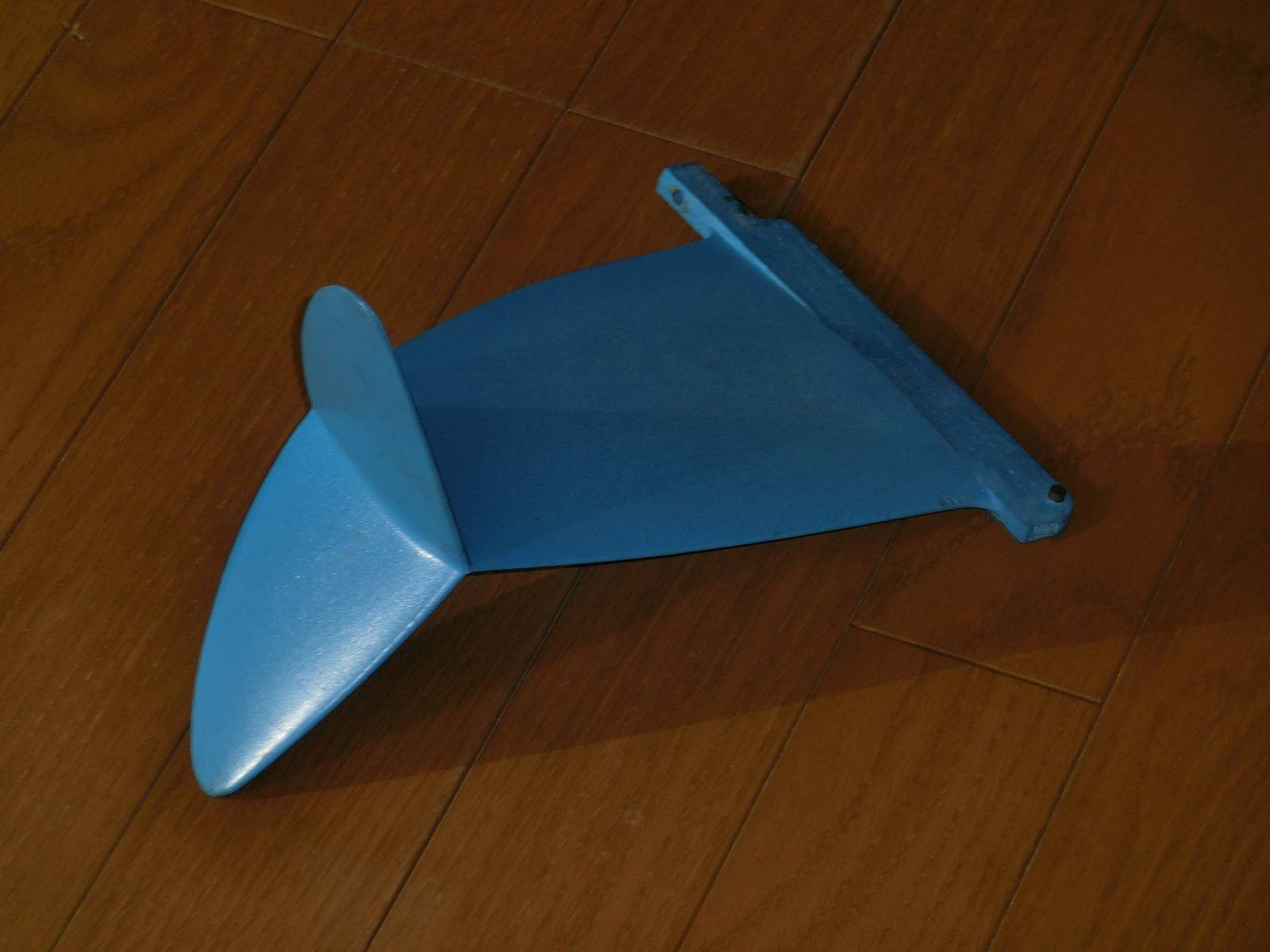 シングルフィンでも可動性の高さを期待されたキールフィン